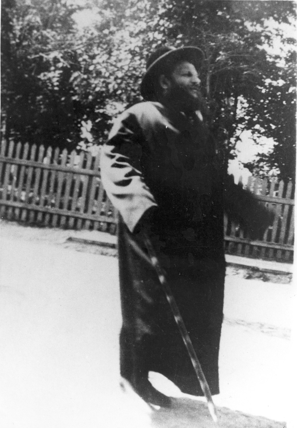 האדמו"ר רבי אברהם וינברג השני מסלונים (סלאנים) ברנוביץ בן האדמו"ר רבי שמואל